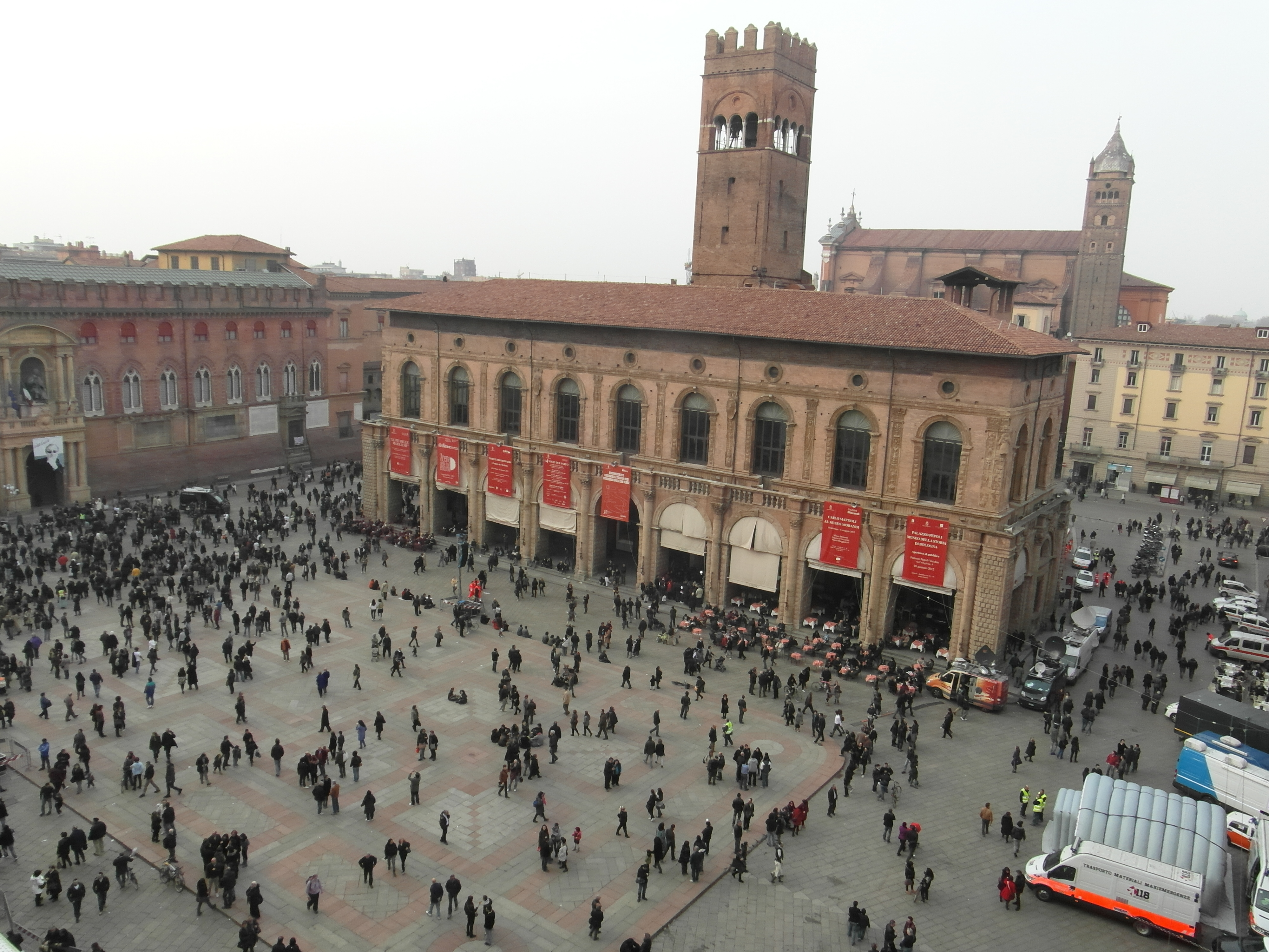 Signori di ieri e di oggi a confronto. La folla si è riunita in Piazza "Grande" Maggiore, per l'ultimo saluto a Lucio Dalla. Idealmente i portici del Palazzo dei Notai, che han reso celebre Bologna all'alba della nascita dell'Università, guardano i portici di Plazzo d'Accursio, acclamato moralmente signore della musica bolognese e punto di riferimento a livello nazionale. This is a photo of a monument which is part of cultural heritage of Italy.